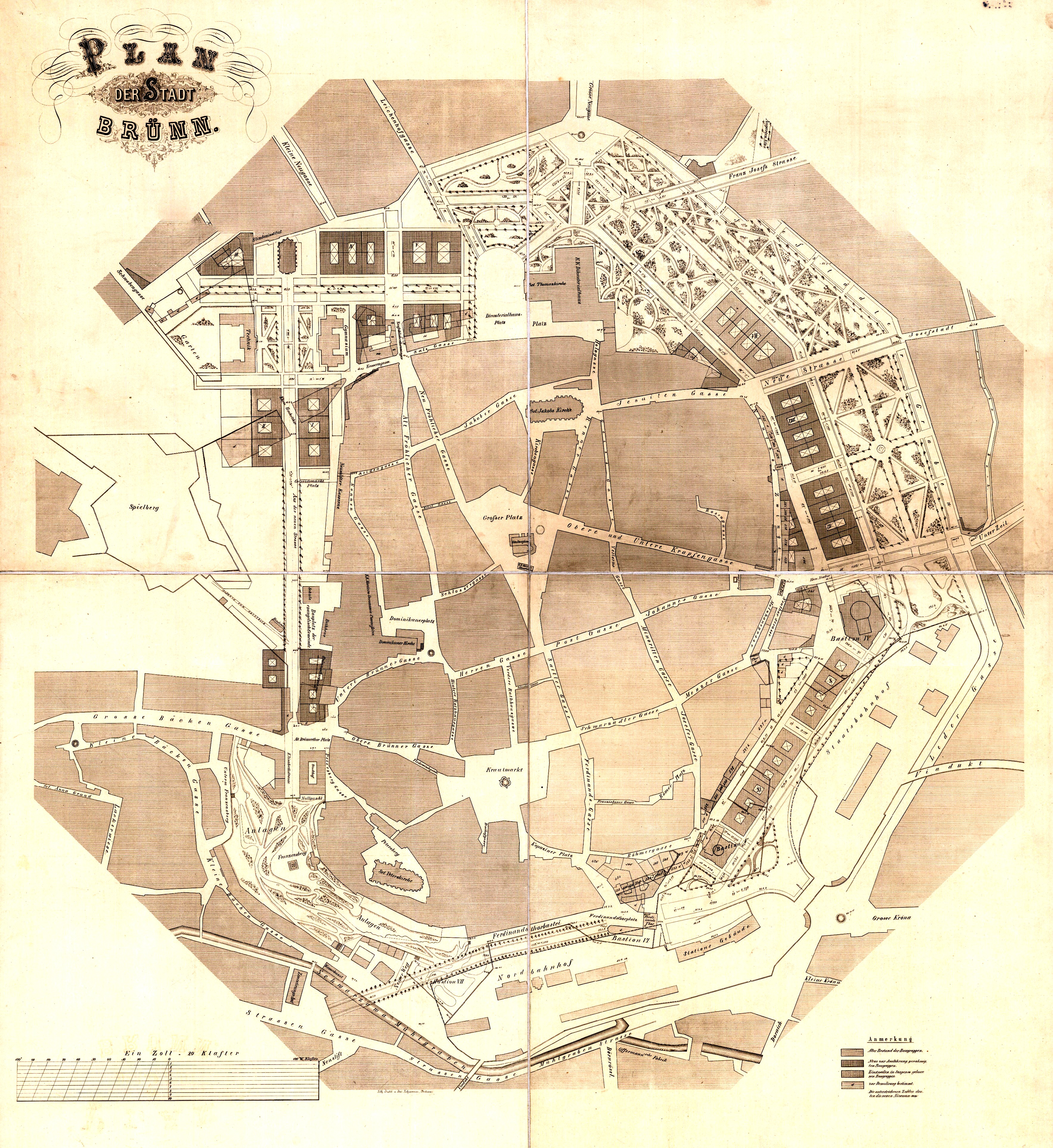 Plán města Brna vydaný Litografickým institutem Josefa Lehmanna v Brně mezi lety 1860 a 1863. Černobílá litografie, rozřezaná a podlepená plátnem, o rozměrech 105,3 x 89 cm